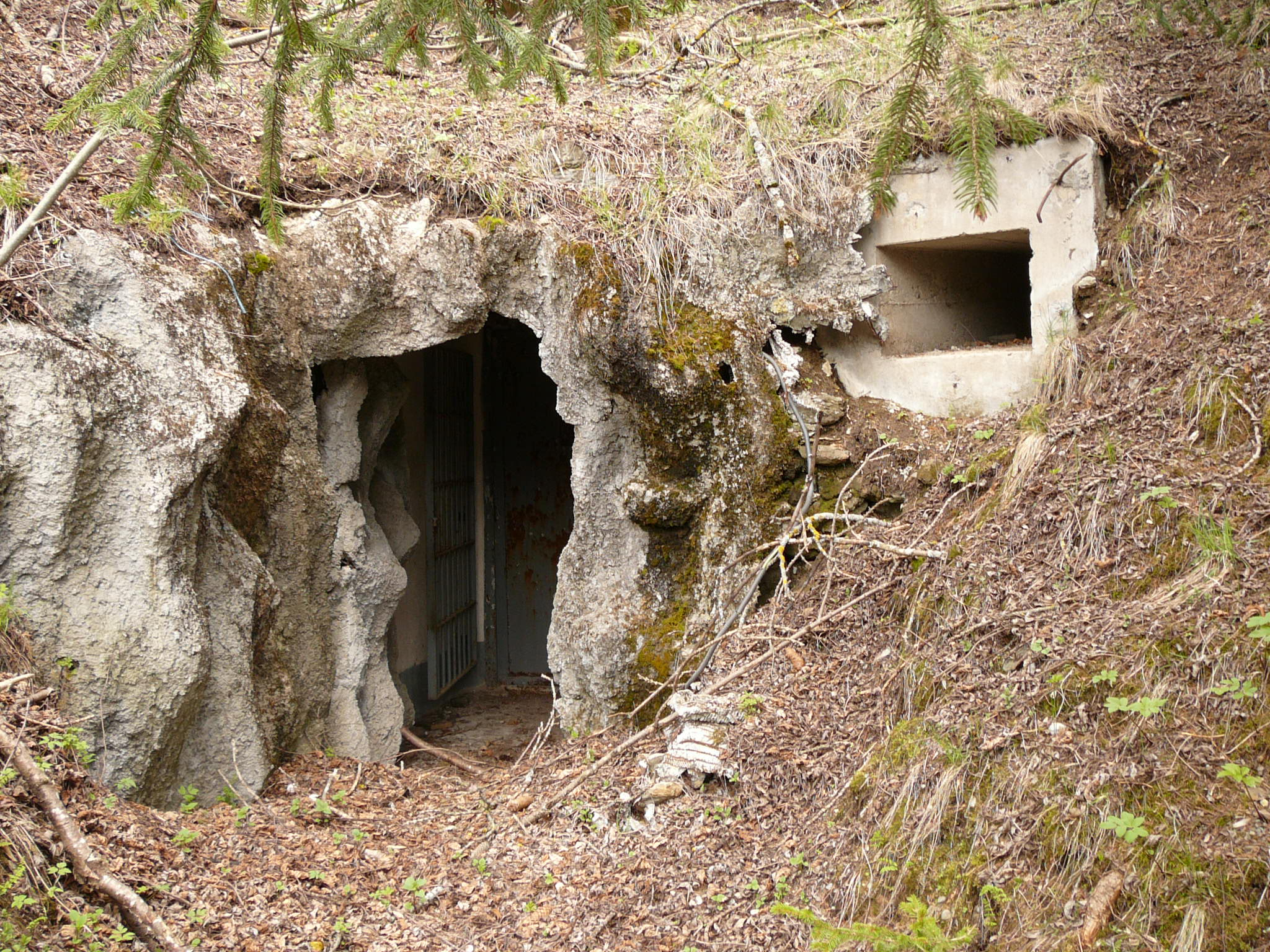 opera 5, sbarr drava